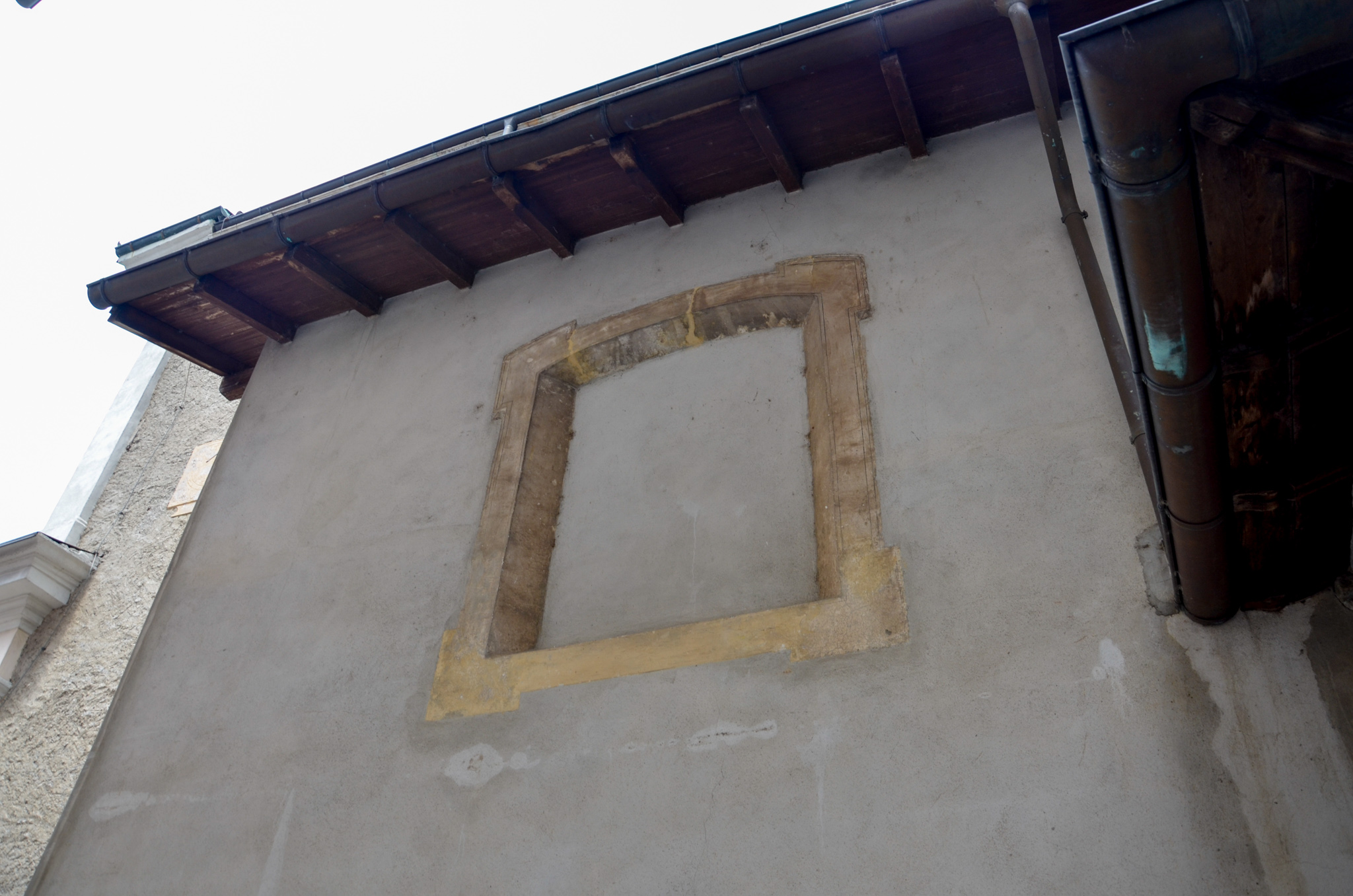 Finestra esterna - Chiesa parrocchiale di San Michele Arcangelo di Brusino Arsizio